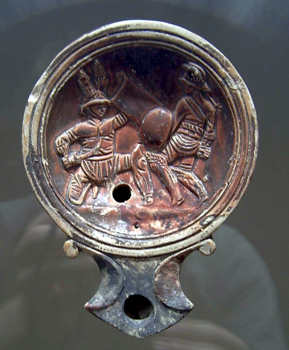 Gladiatoren auf einer Öllampe im Römisch-Germanischen Museum Köln